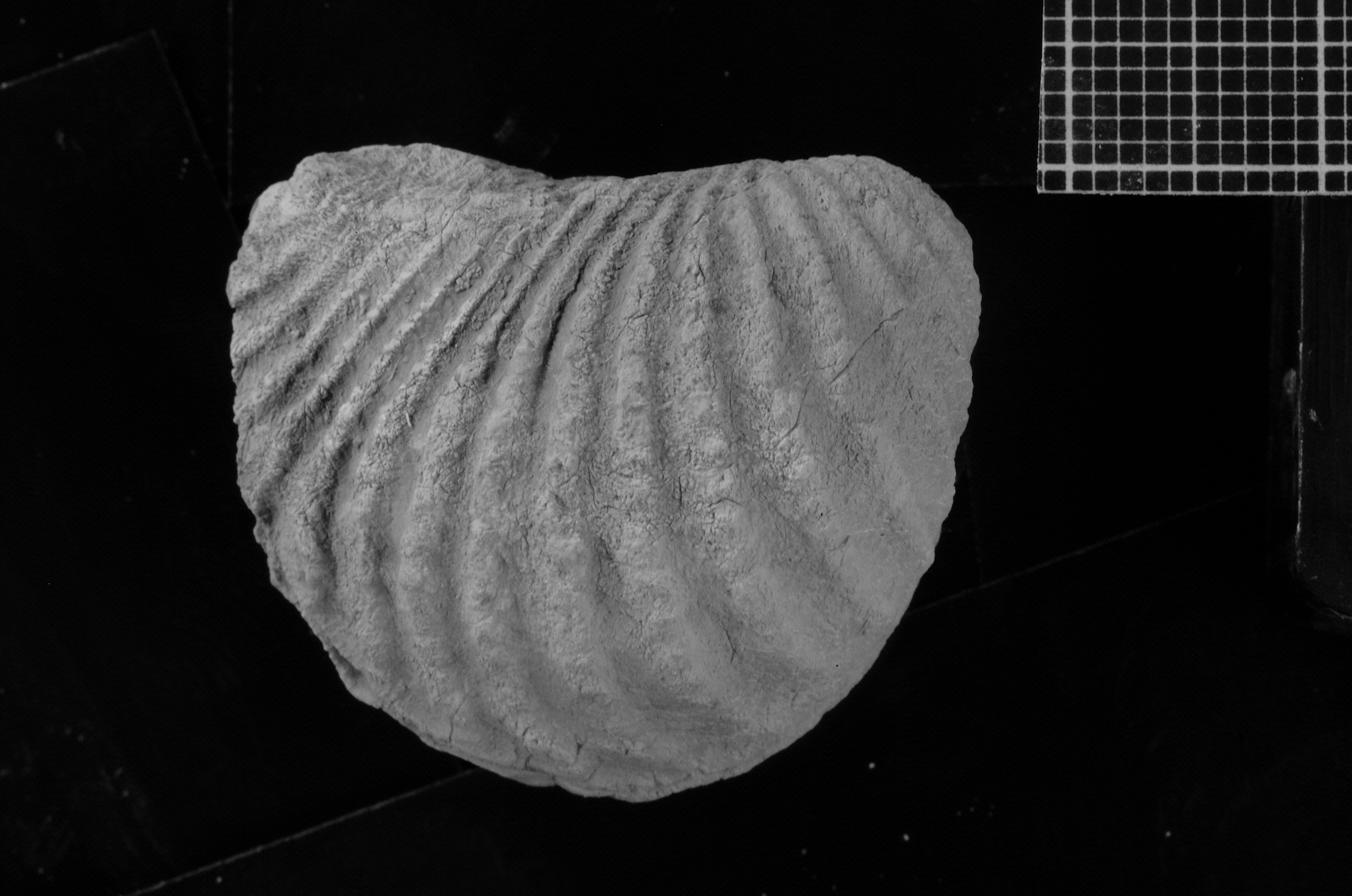 Vista derecha de un ejemplar articulado de Pterotrigonia coihuicoensis